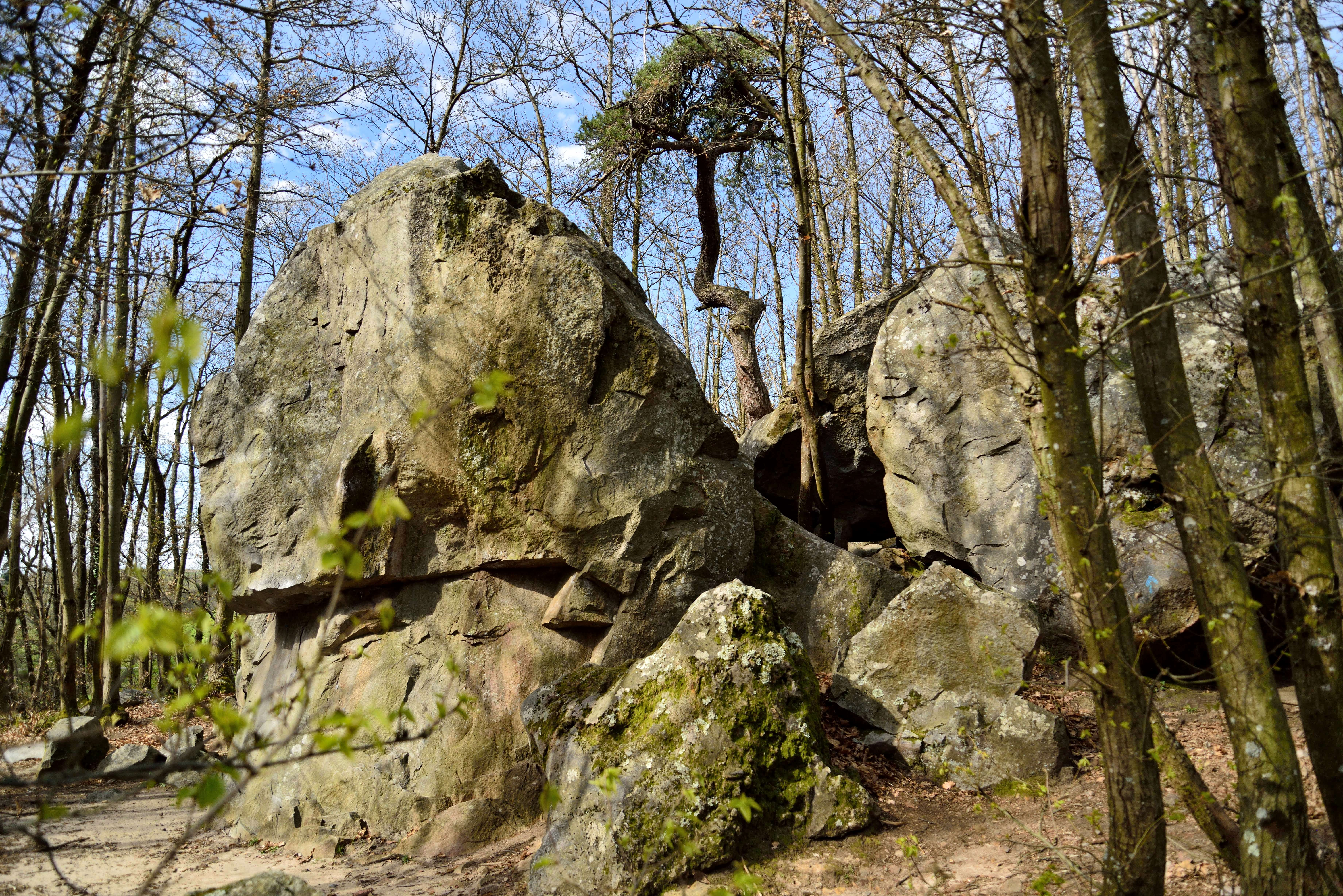 "roches qui dancent" st barthelemy de vals